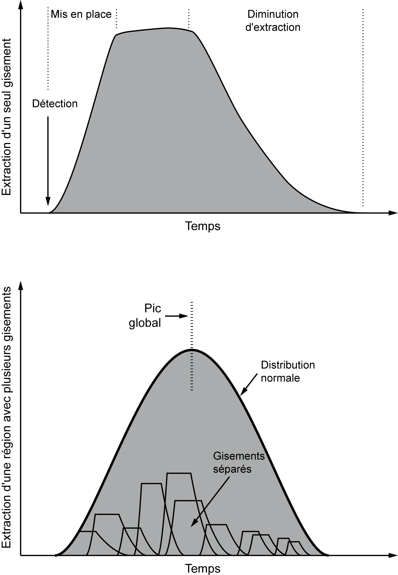 Pic de Hubbert